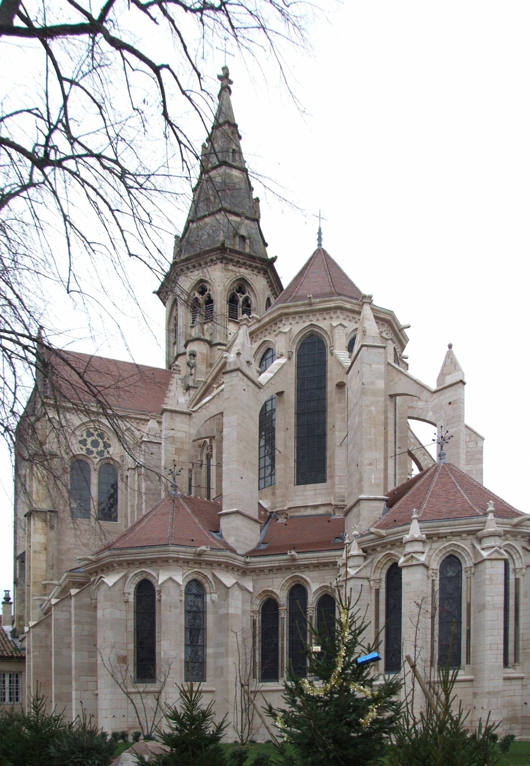 Collégiale Notre-Dame de Semur-en-Auxois, chevet